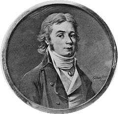 Thomas Andreas Aspelin